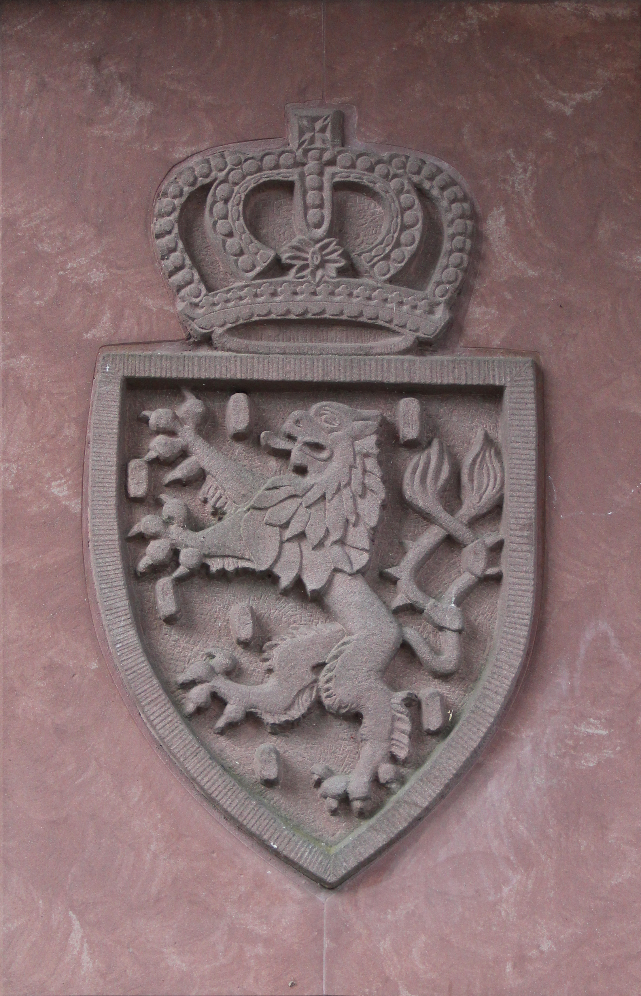 Dorheim